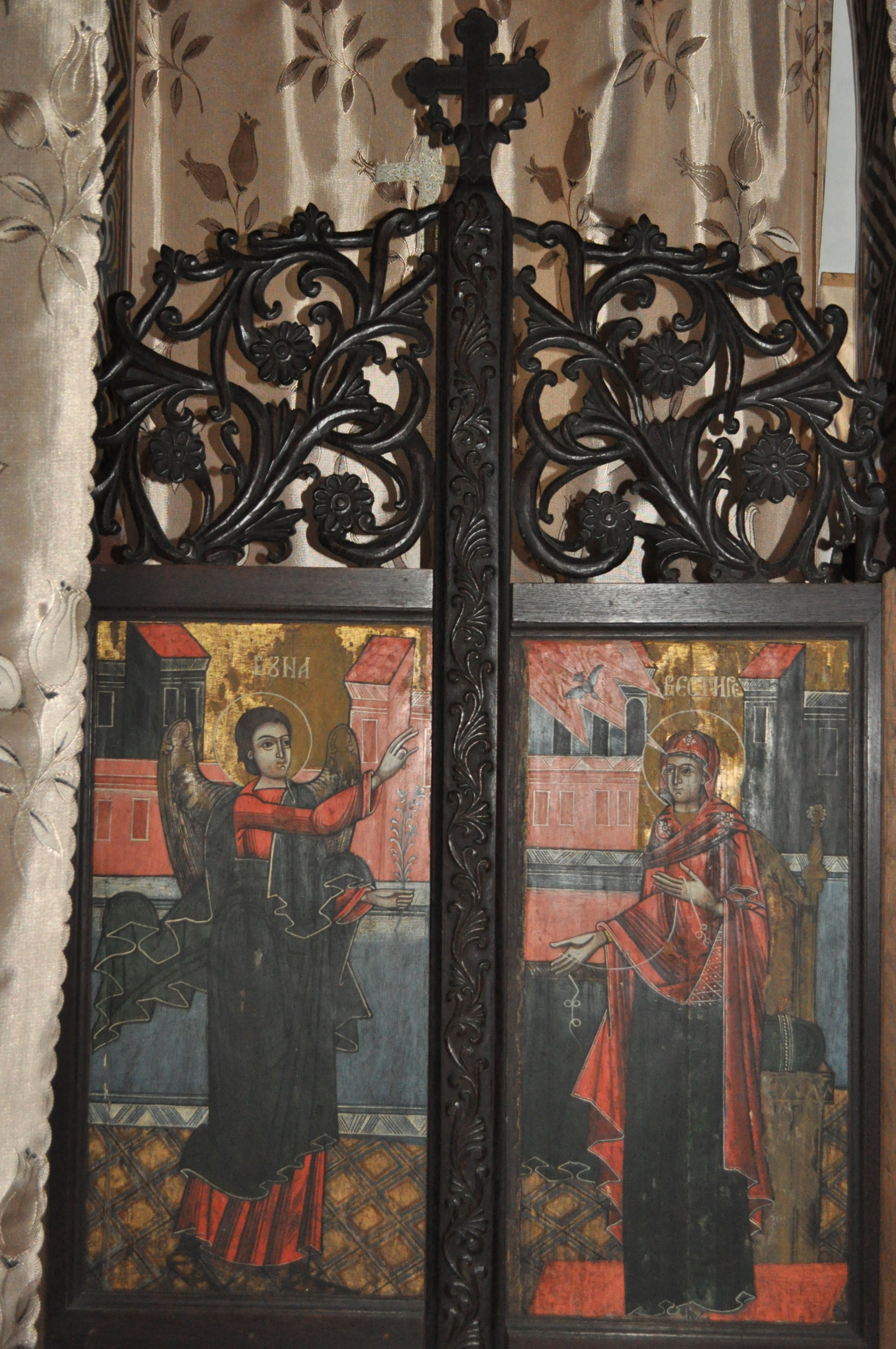 Biserica "Adormirea Maicii Domnului", sat Arpașu de Sus; comuna Arpașu de Jos, județul Sibiu